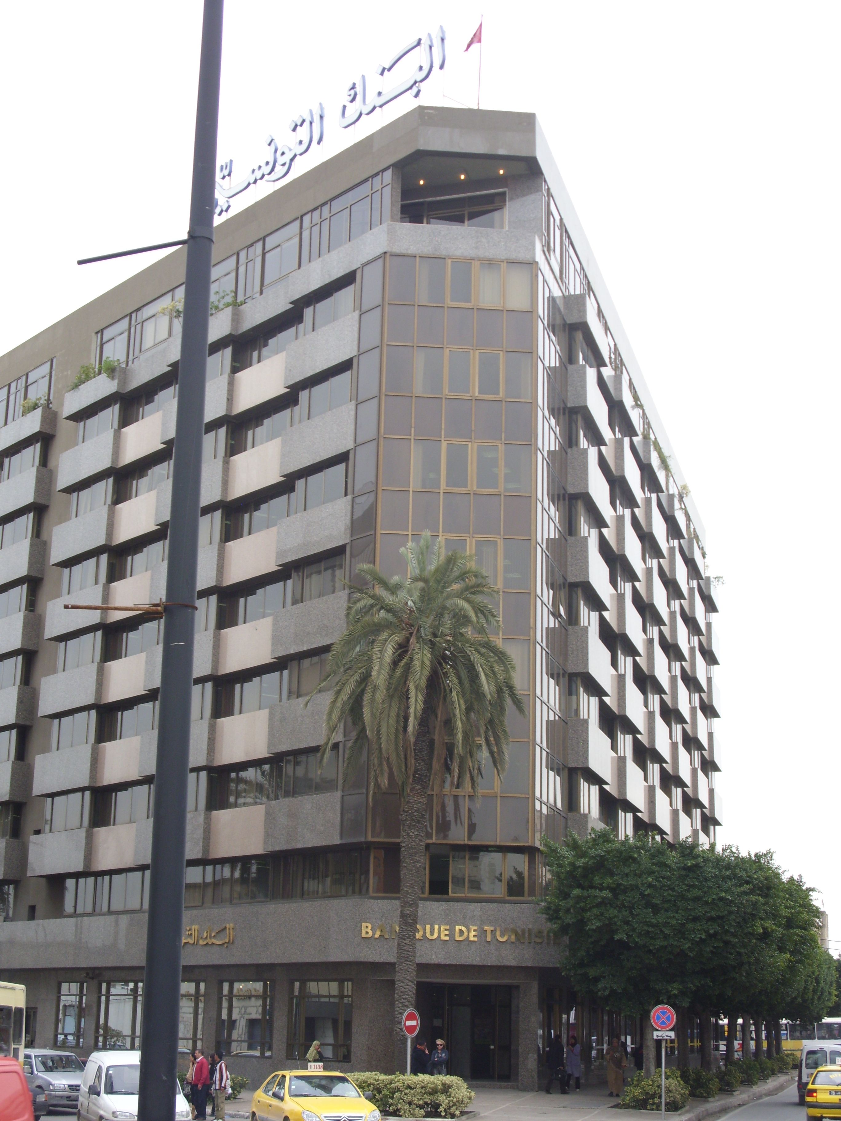 Headquarters of "Banque de Tunisie"